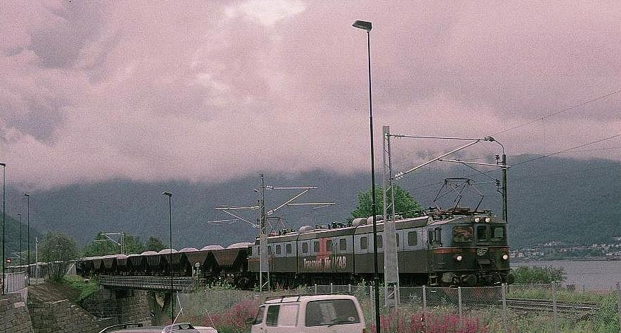 Tog lastet med olivin, som skal til pelletsverket i Svappavara, passerer brua over E6 i Narvik. Olivinen ble lastet opp på havna i Narvik og sendt som returlast med noen av malmtogene.